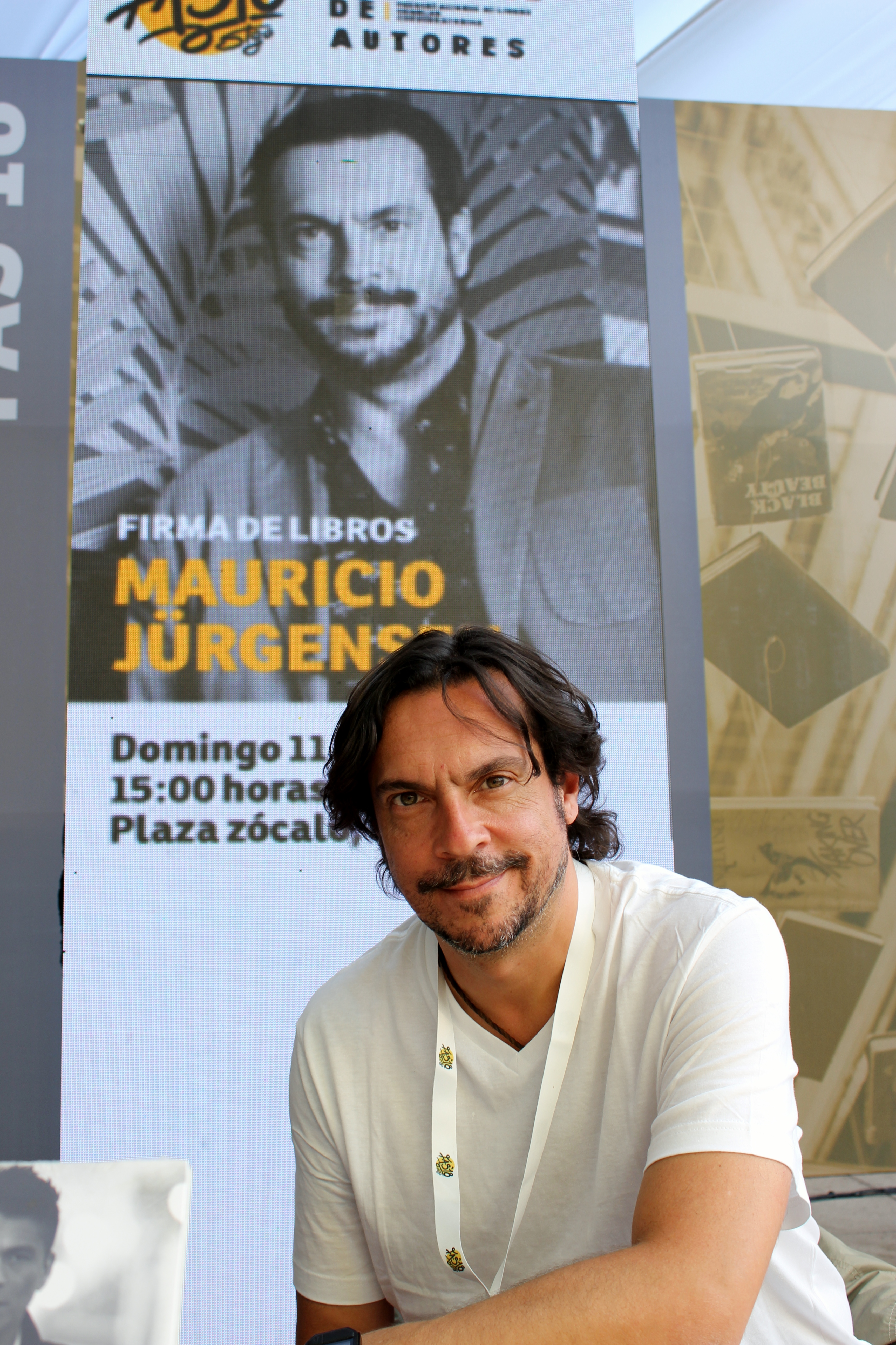 El periodista chileno Mauricio Jürgensen durante una sesión de firma de su libro Yo soy Américo en la segunda etapa del Festival de Autores de Santiago 2018 realizada en el GAM.